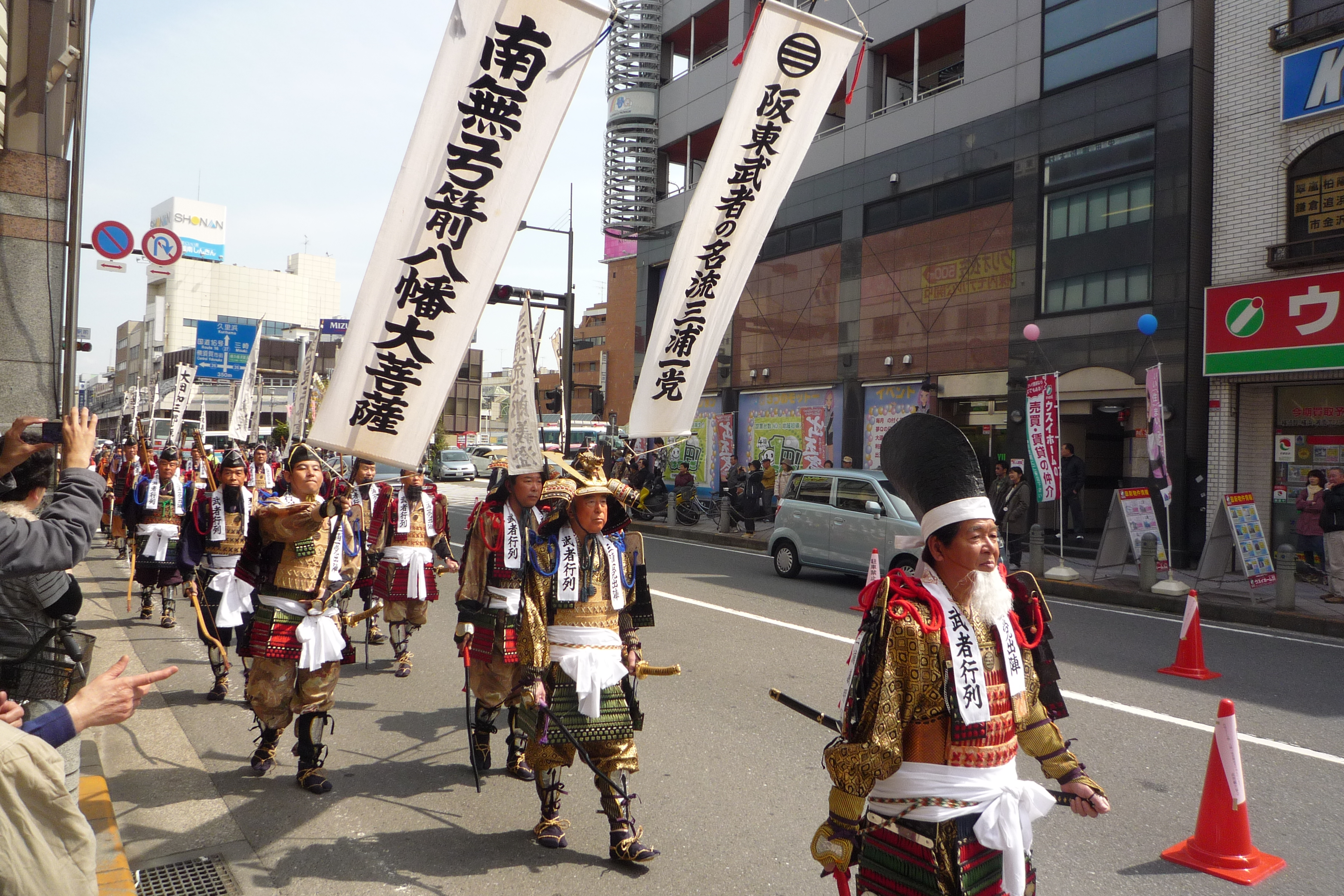 2010年に衣笠商店街で行われたパレード。三浦一党出陣武者行列